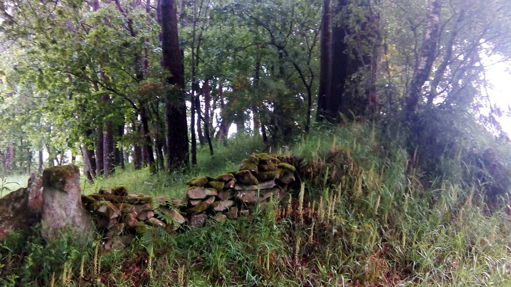 Defensas do castro de Pedreira, Curtis.